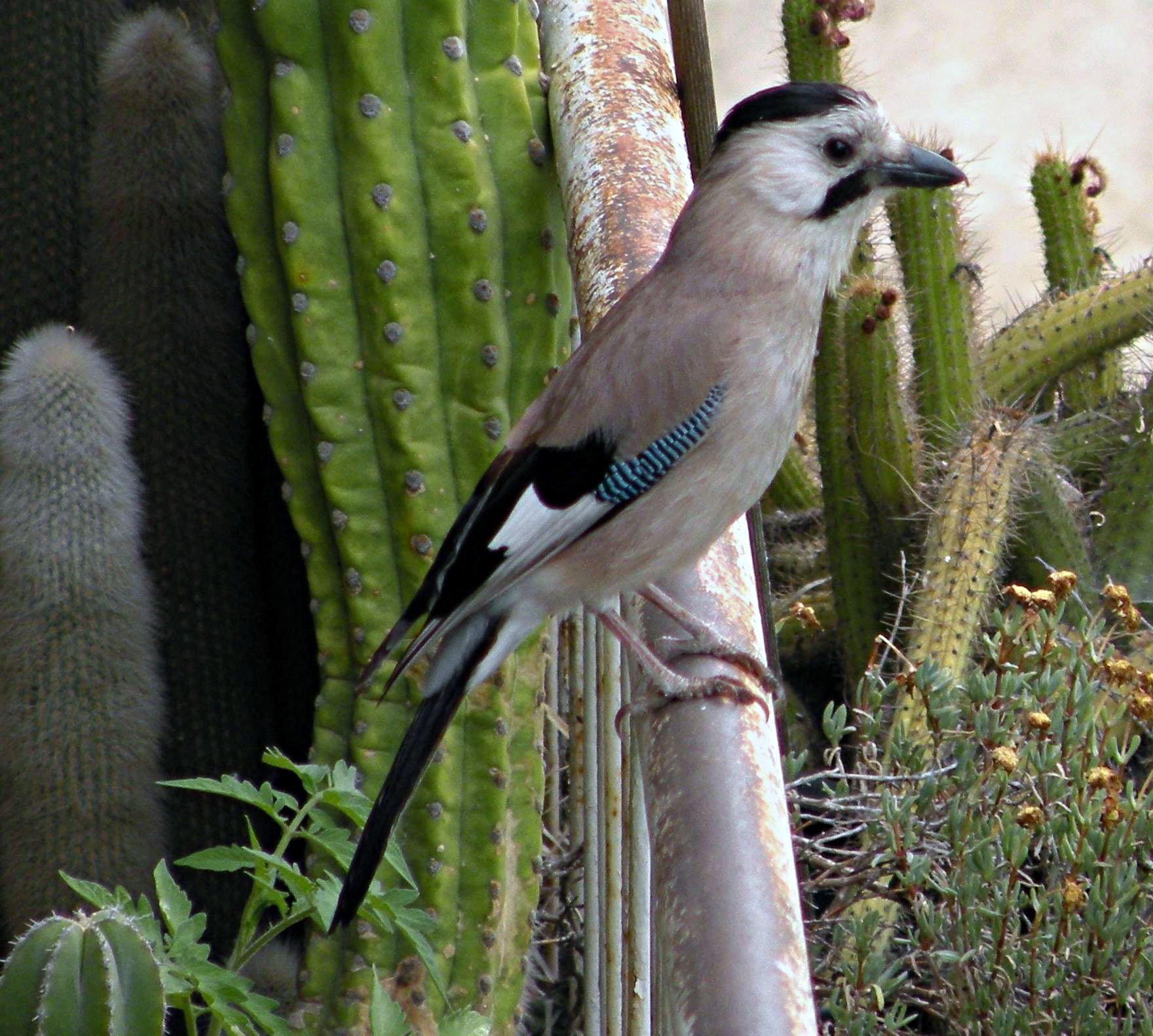 Garrulus glandarius in Jerusalem